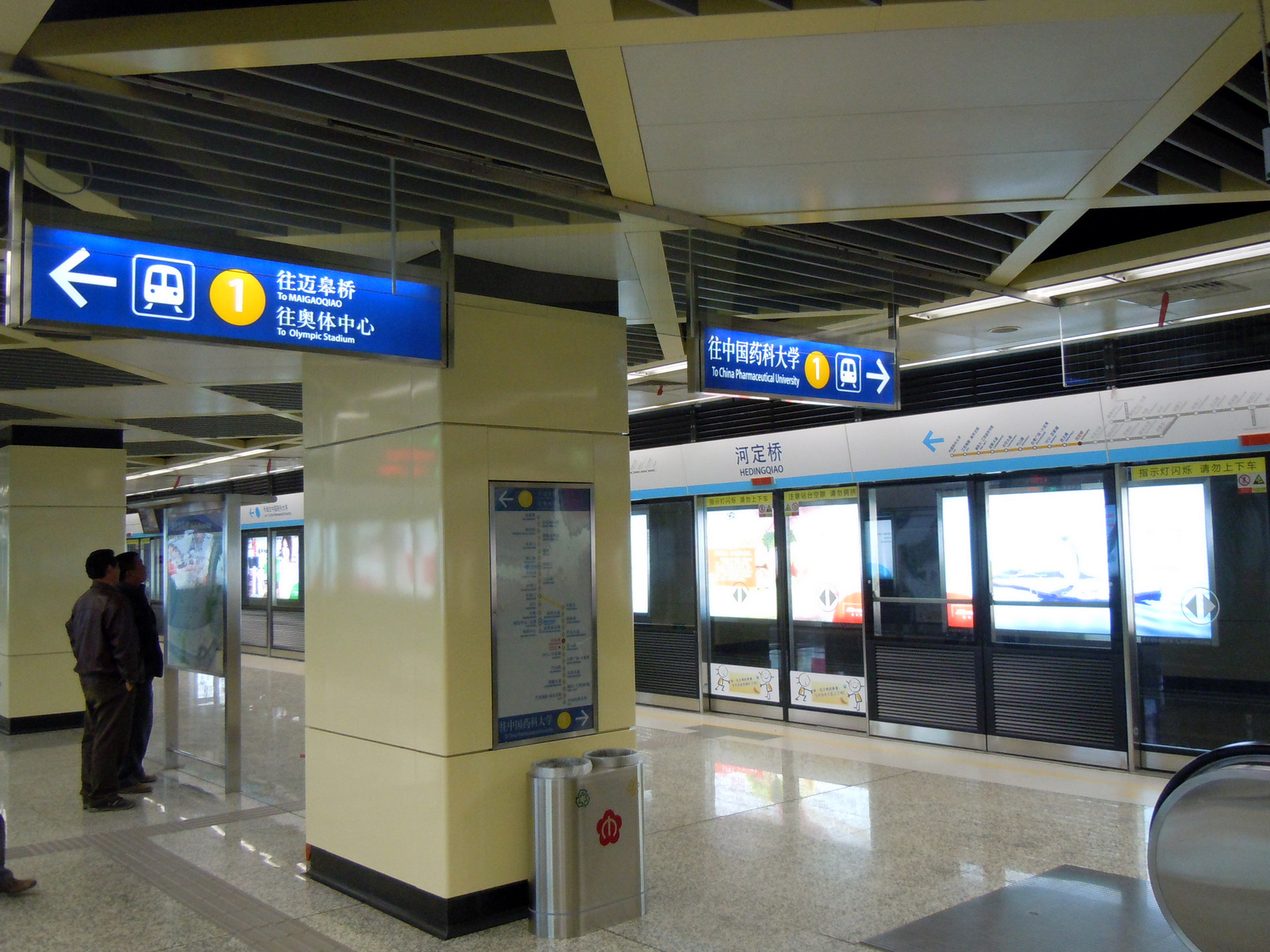 南京地铁河定桥站站台